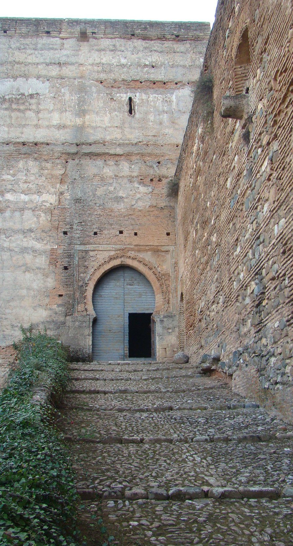 Acceso a la Puerta de las Armas desde la ciudad musulmana